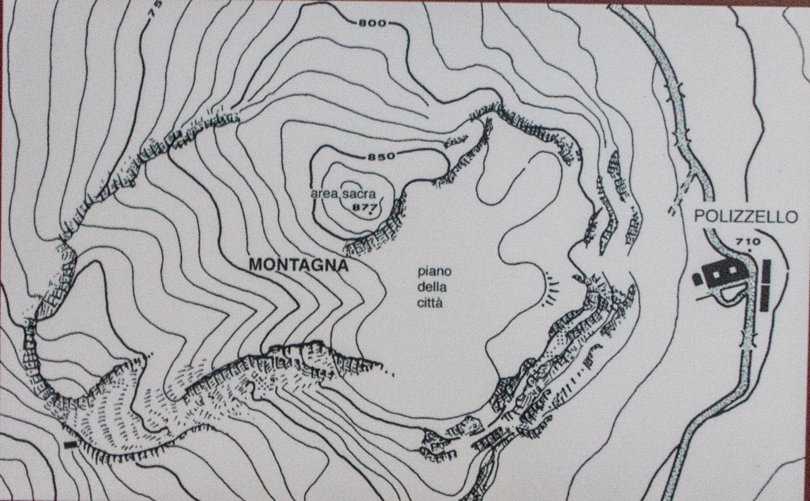 Planimetria della montagna di Polizello